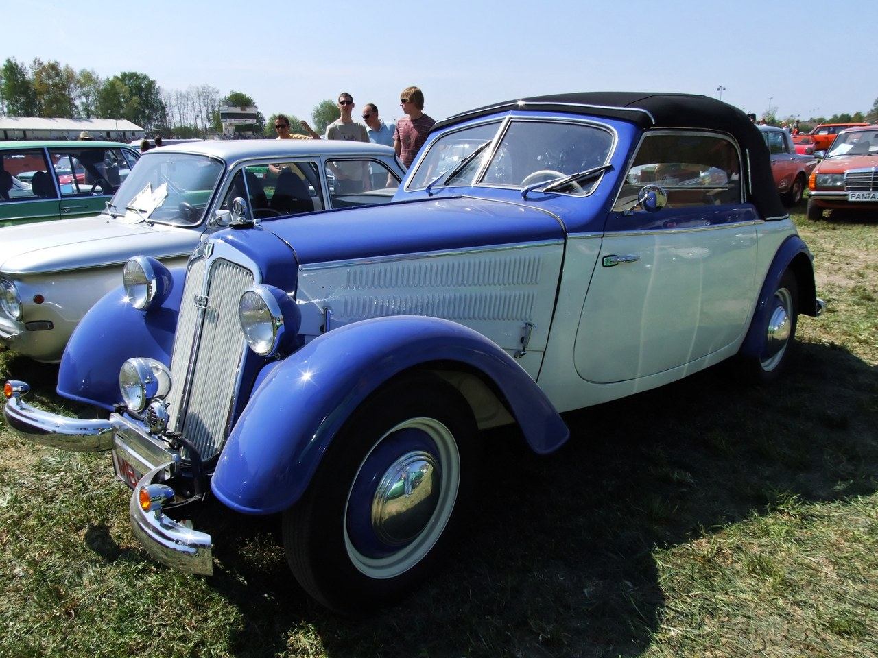 Quelle: selbst fotografiert, 04/2007 Fotograf: Späth Chr.